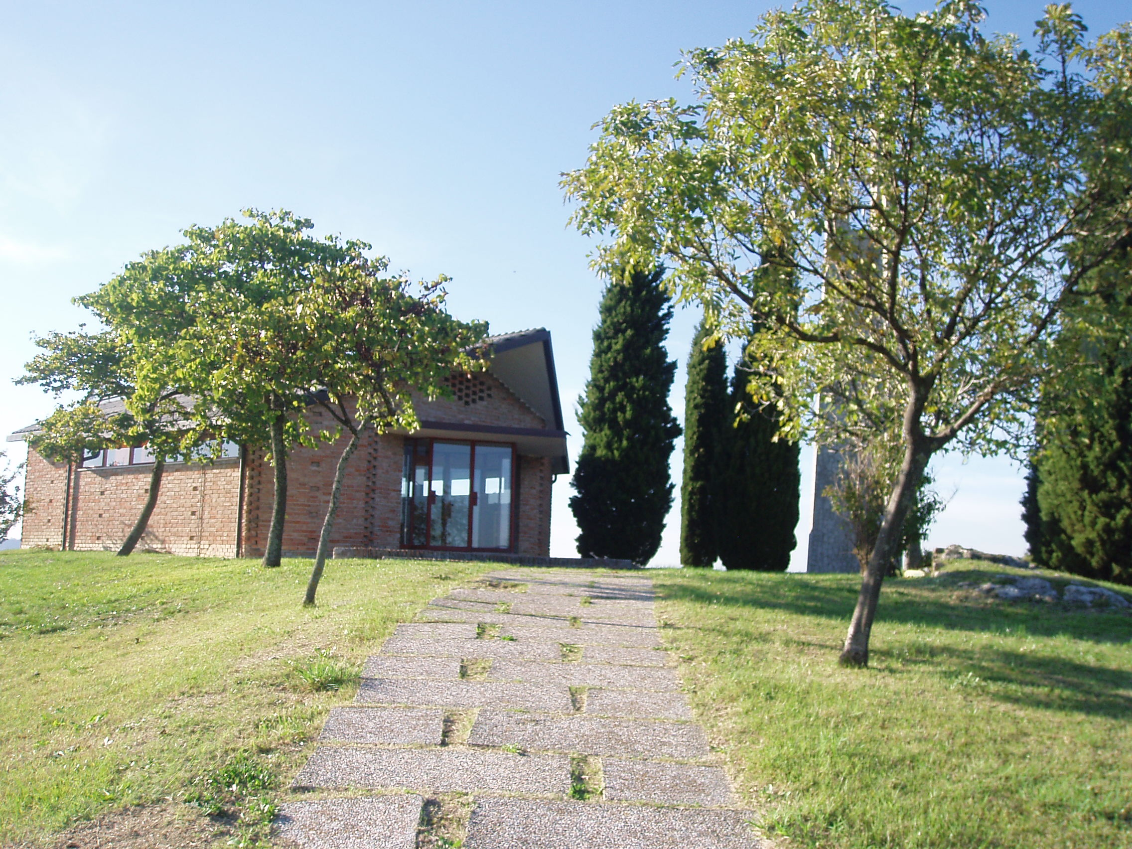 Vista di Torraccia